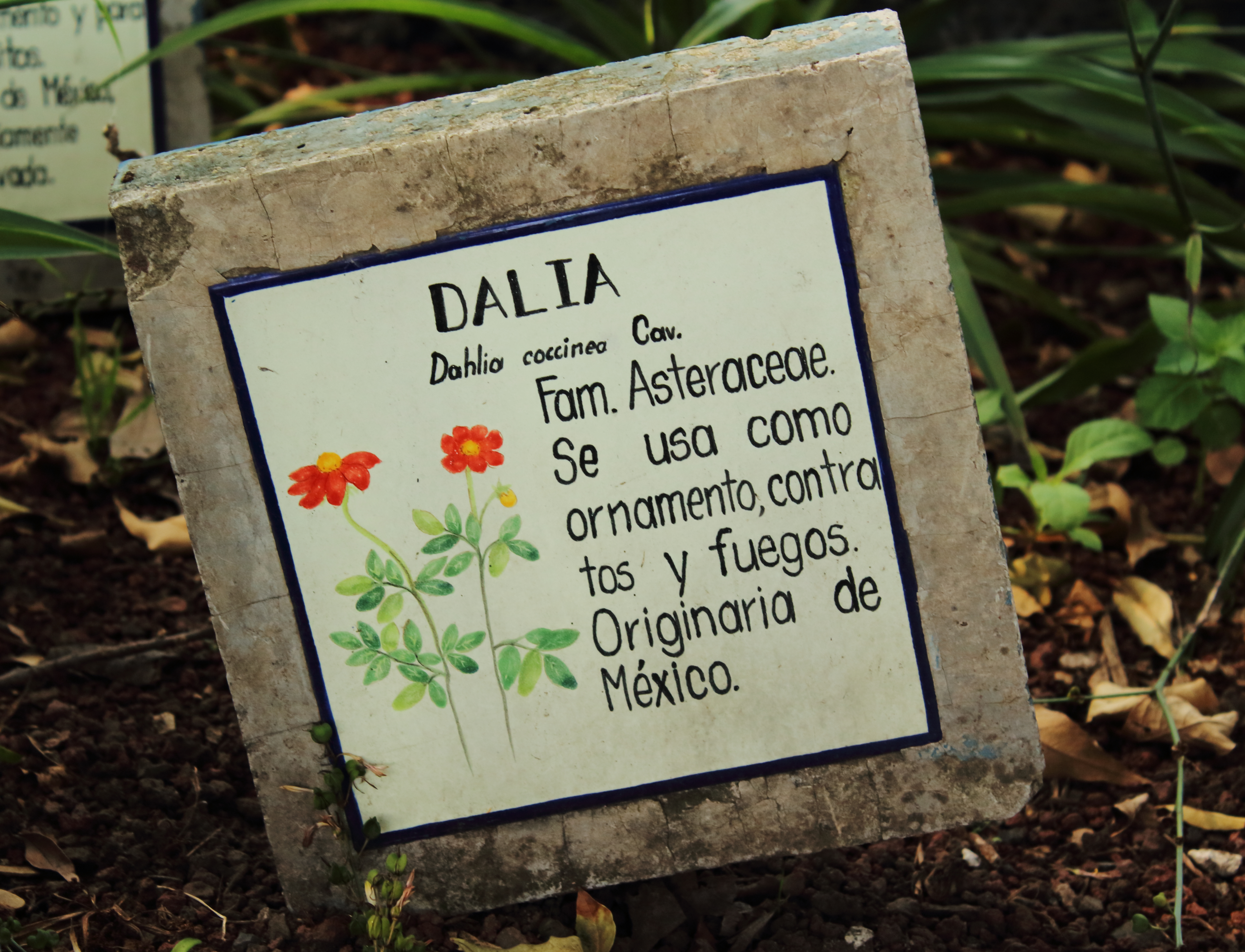 Breve descripción sobre la Dahlia coccinea en el jardín botánico de la UNAM, México.